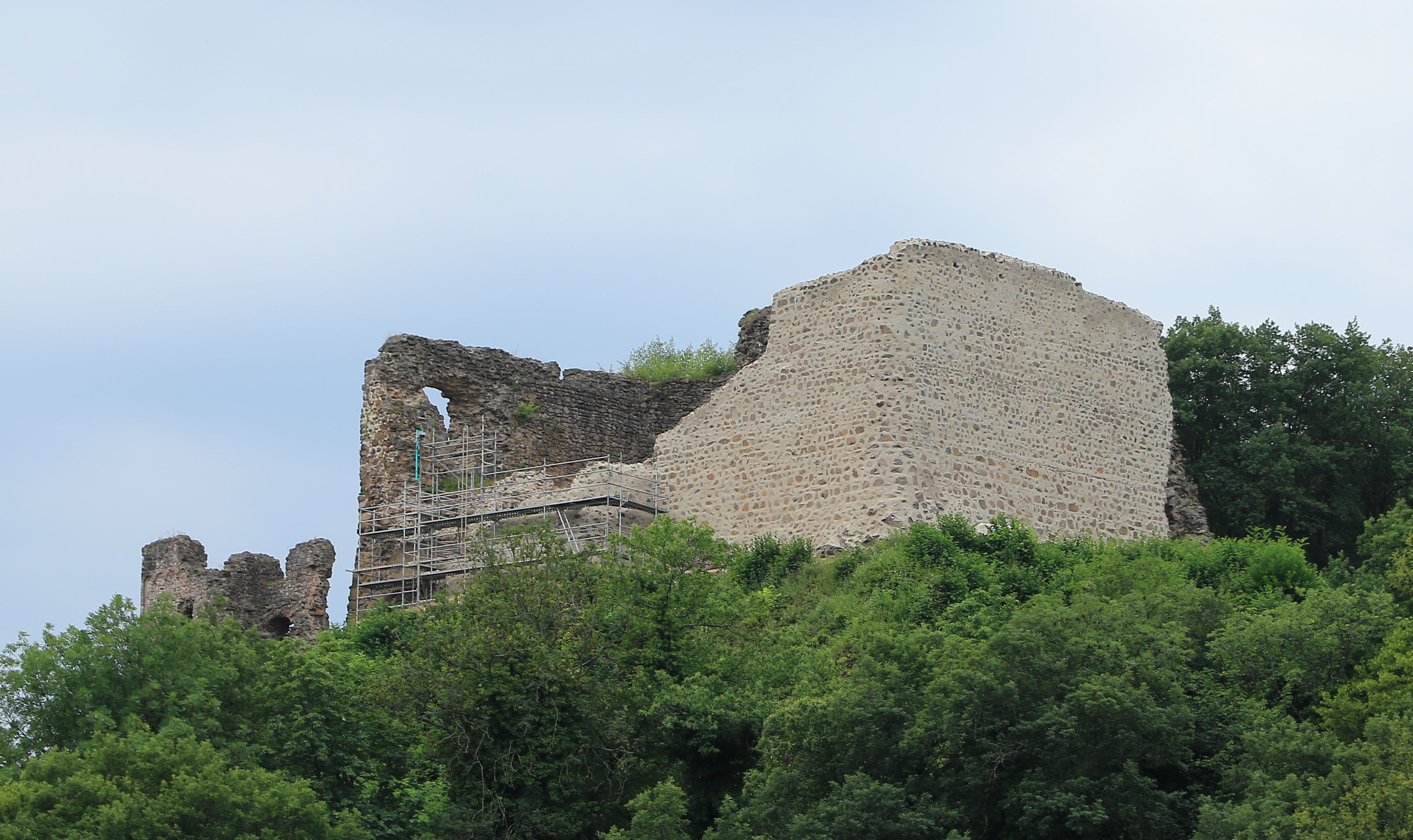 Sous prétexte de protection et de sécurisation, la ruine du XIII e siècle est recouverte de béton. Le charme ancien du château et les détails historiques sont détruits à jamais.